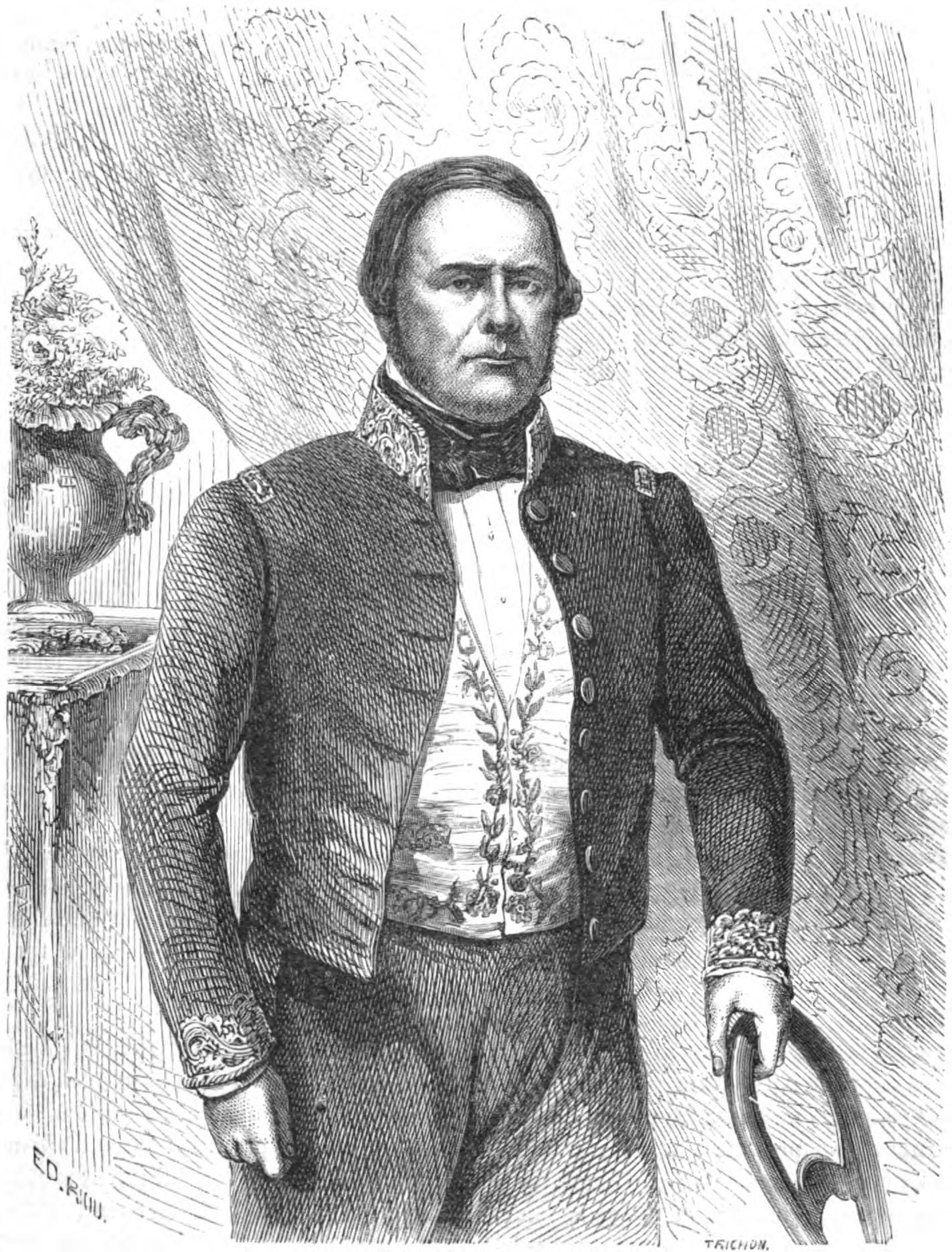 Urquiza, président des Provinces-Unies de la Plata (Dessin de Hadamard d'après une photographie).